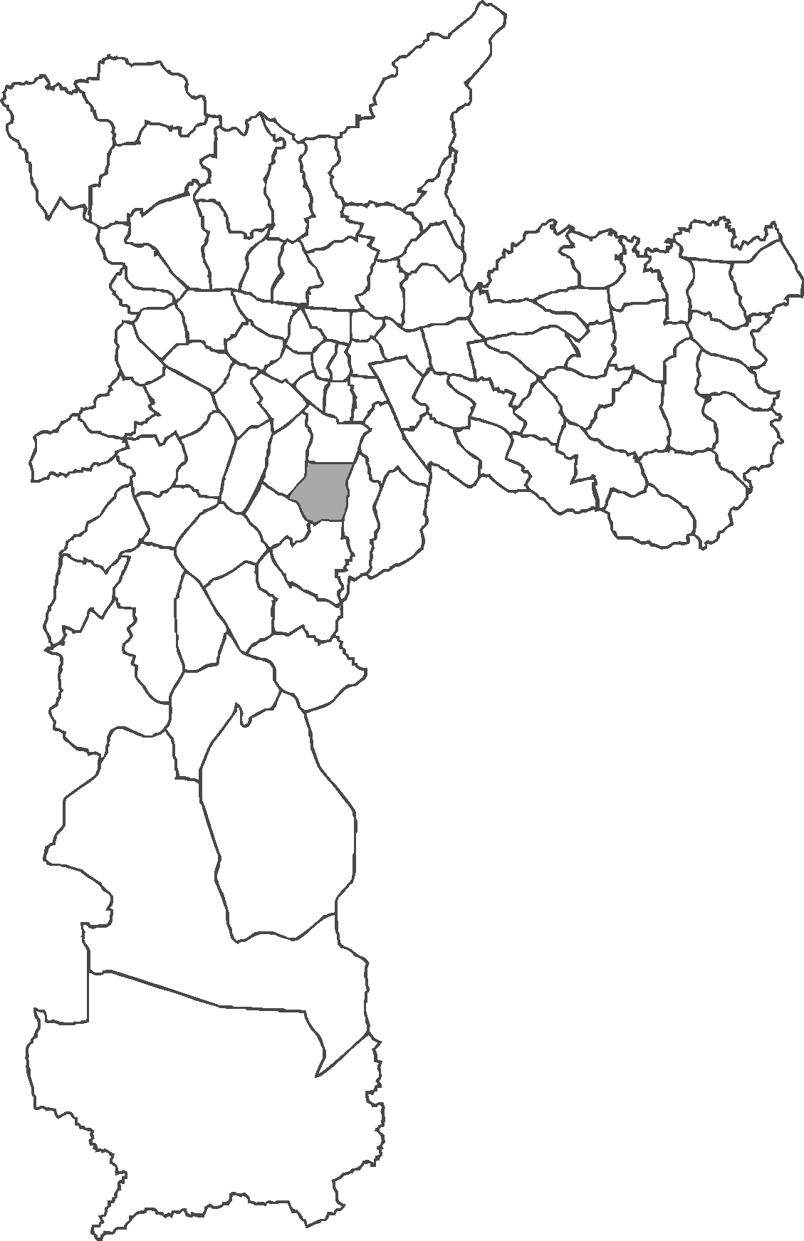 Distrito de São Paulo